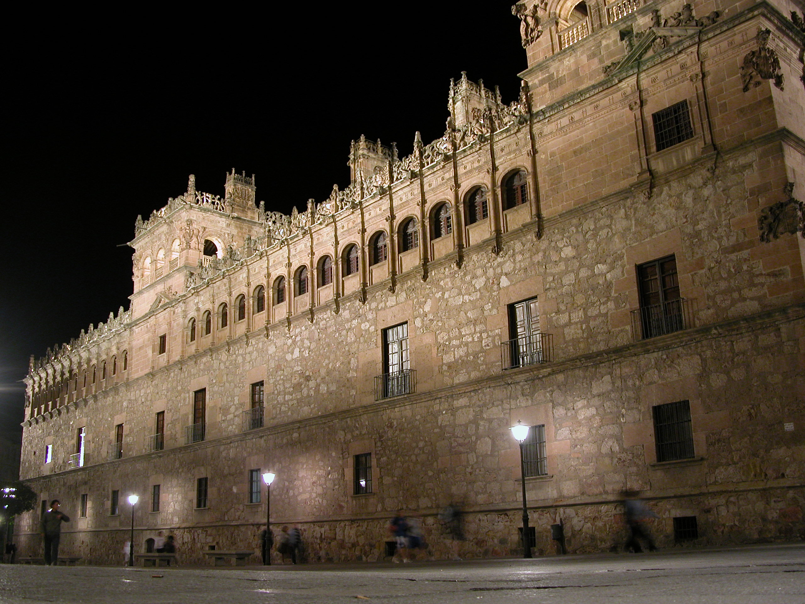 Vista nocturna del palacio de Monterry en Salamanca